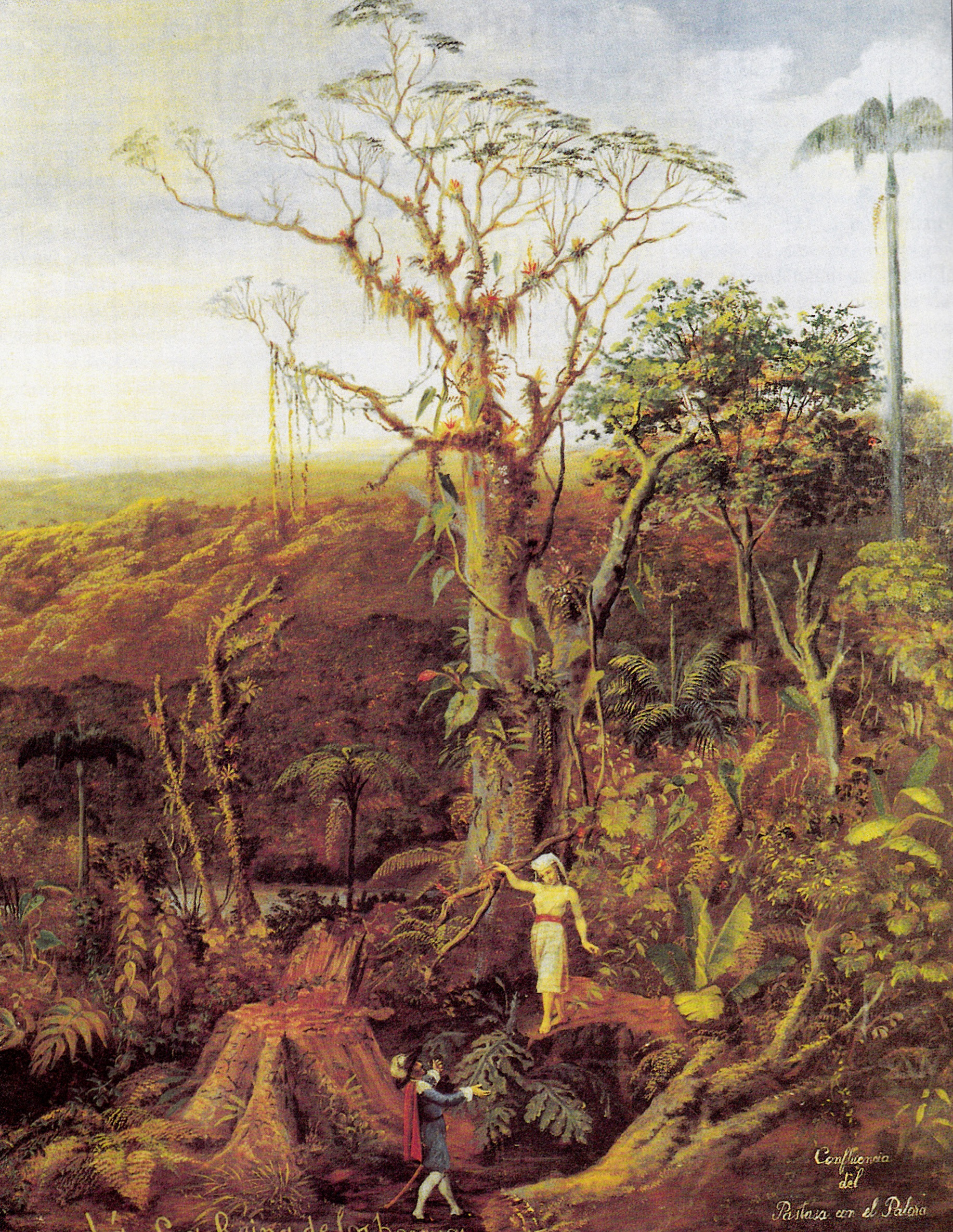 "Cumandá, la Reina de los bosques", Rafel Salas, siglo XIX. Óleo sobre lienzo que representa el encuentro entre Cumandá y Carlos Orozco, personajes principales de la famosa novela de Juan León Mera.